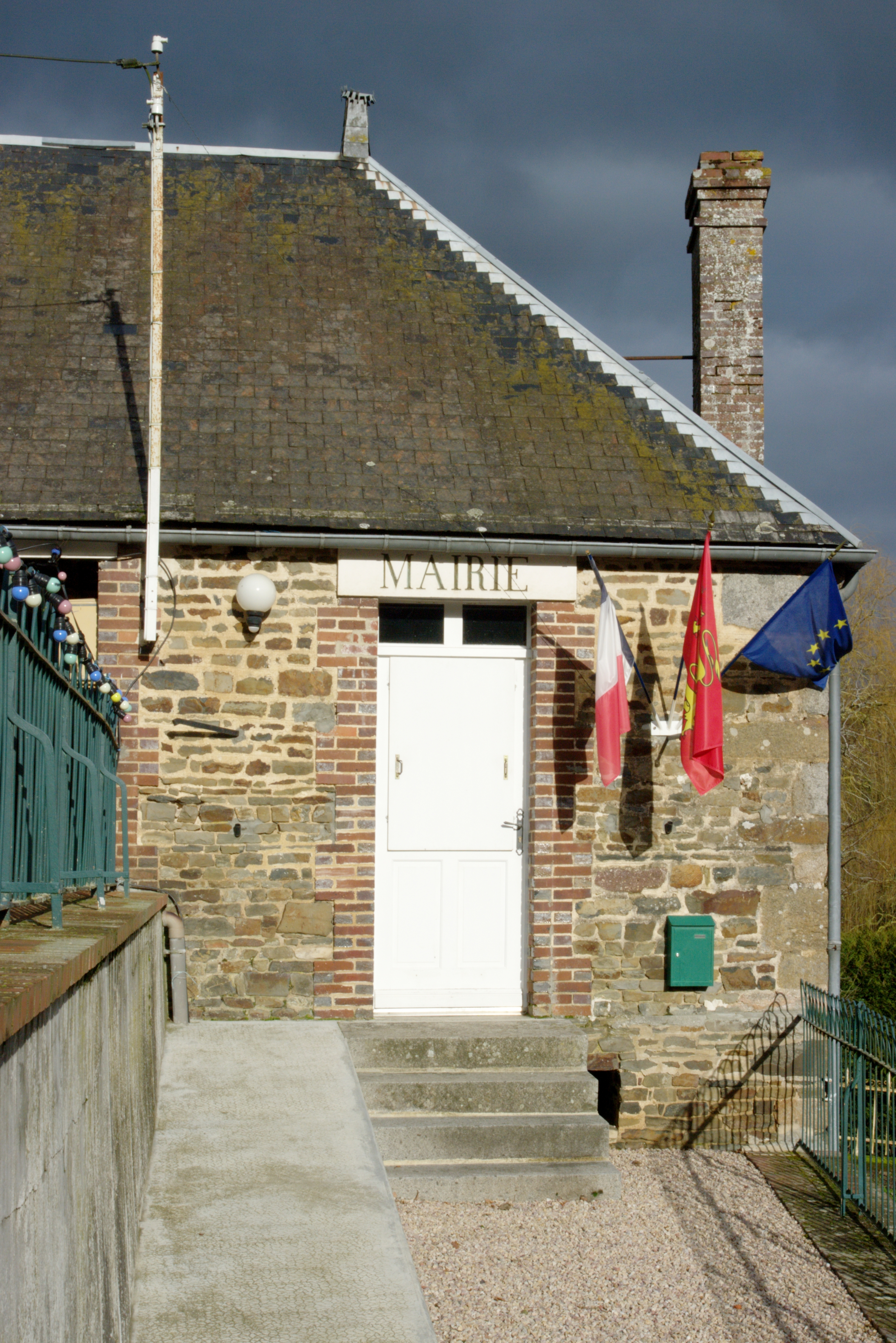 La Mairie, Les Isles-Bardel, Calvados.